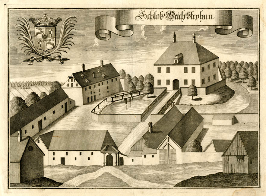 “Schloß WeichStephan” (Weihenstephan, Gemeinde Hohenthann), aus : Beschreibung des Churfürsten- und Hertzogthumbs Ober- und Nidern Bayrn. Rentamt Landshut, Gericht Rottenburg, 1723